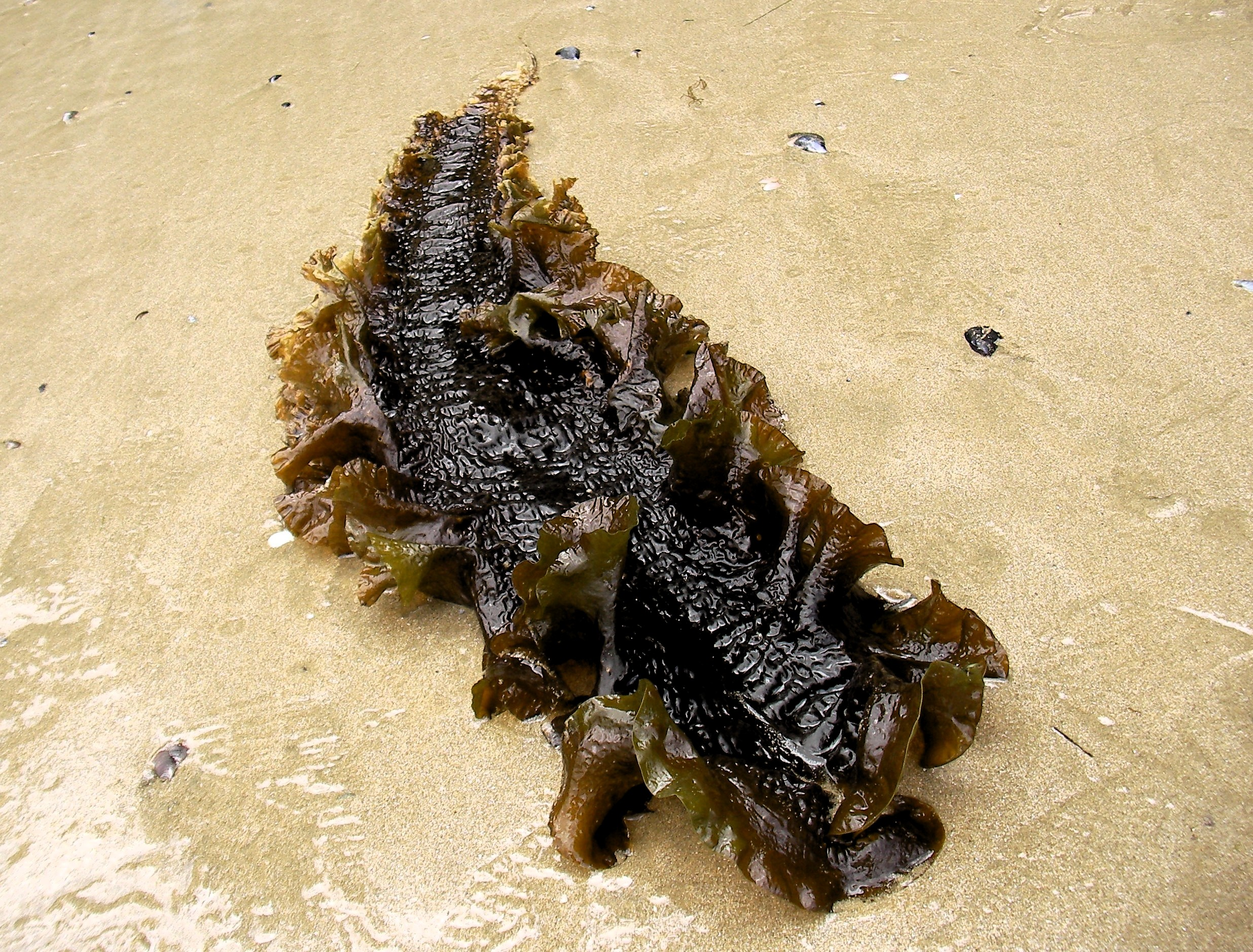 Talo dunha Saccharina latissima nunha praia galega. Nomes: Toco, Soia, Cañoto, Kombu de azucre